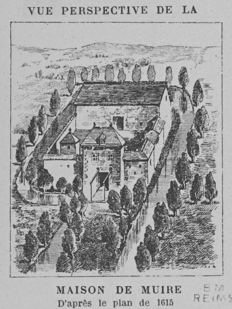 La maison de Muire publié en 1908.